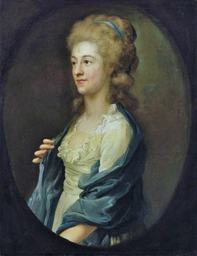 Friederike Charlotte Bause, porträtiert von Anton Graff